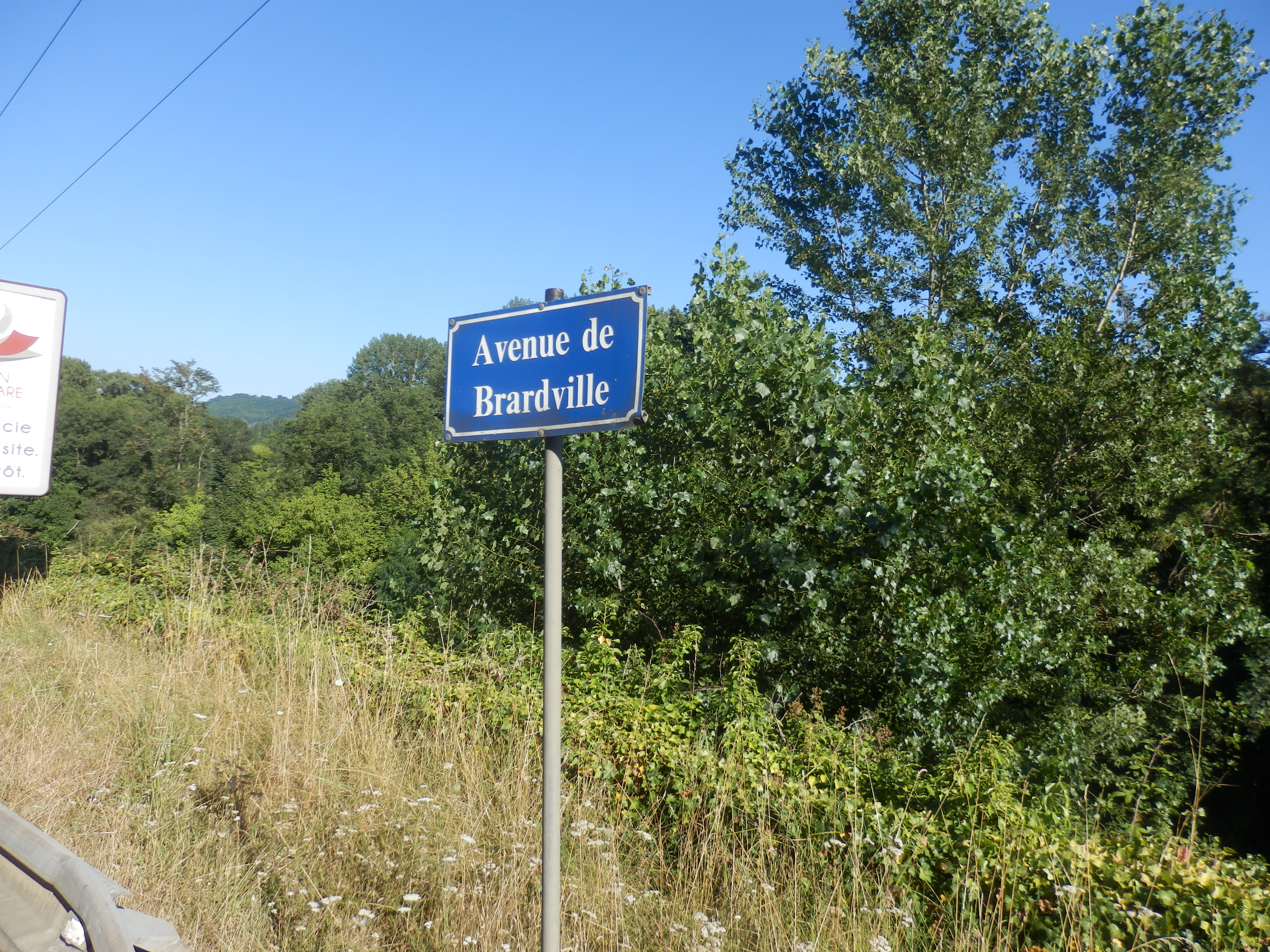 Route allant du Lardin-Saint-Lazare à Terrasson, lieu dit Brardville, au niveau de l'ancienne verrerie